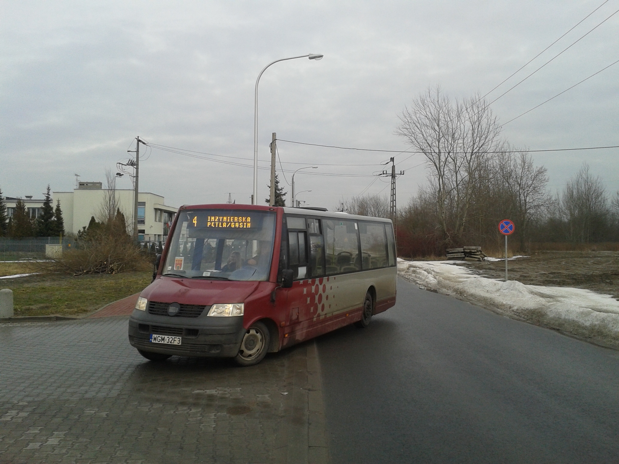 Linia 4 w Pruszkowie na ulicy Parzniewskiej